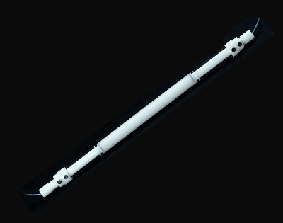 GPC Säule SX-3